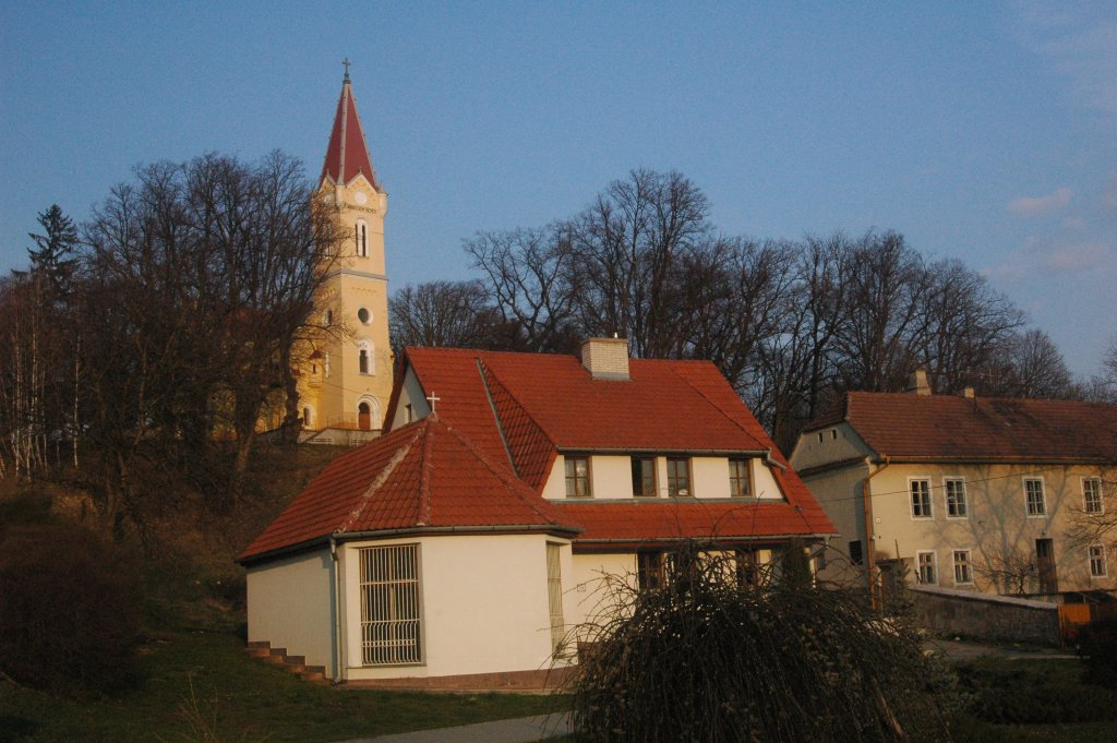 Prietrž, church